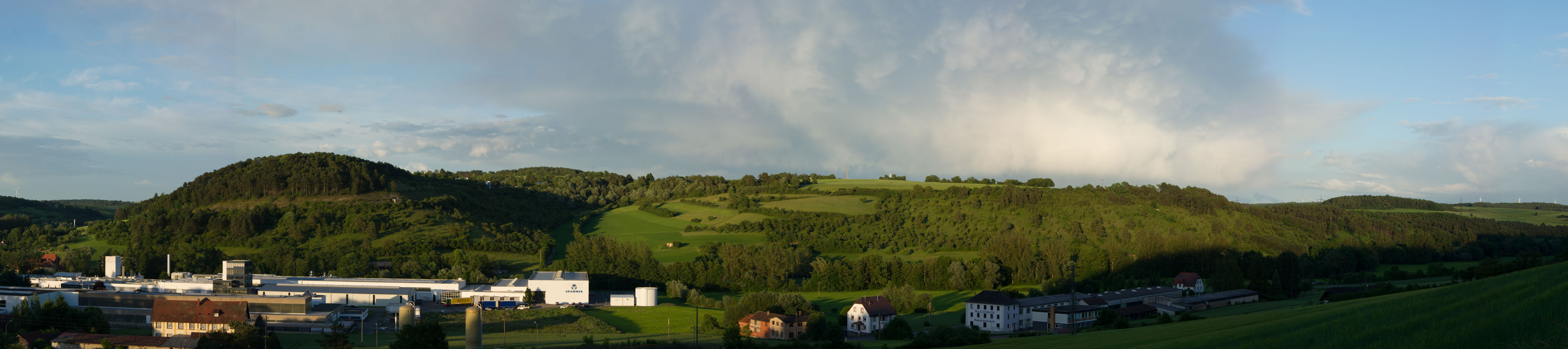 Blick über das gesamte LSG Wacholder und Brücklein in der Nähe von Hardheim